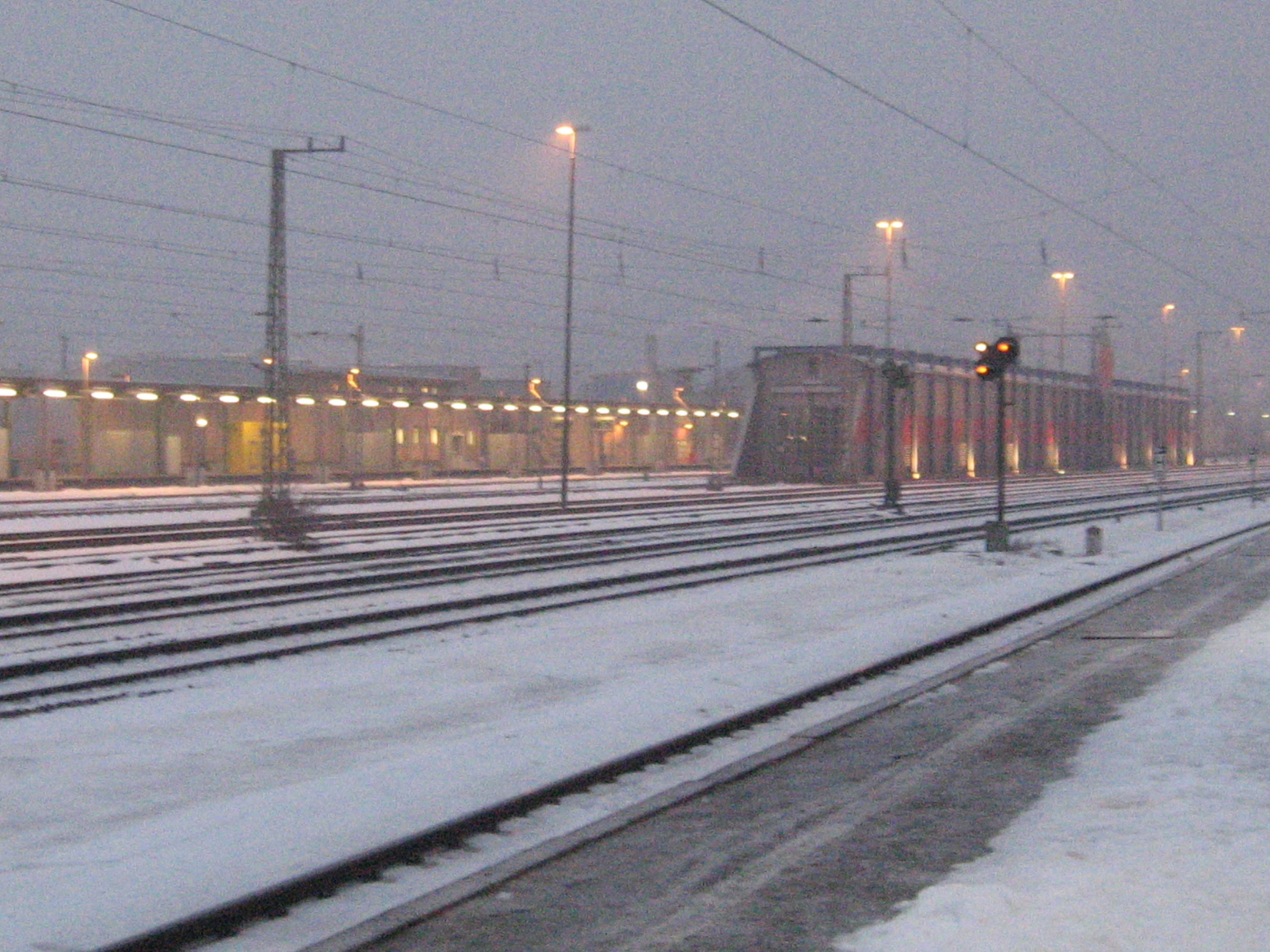 Bahnhof Frankfurt-Höchst Farbwerke